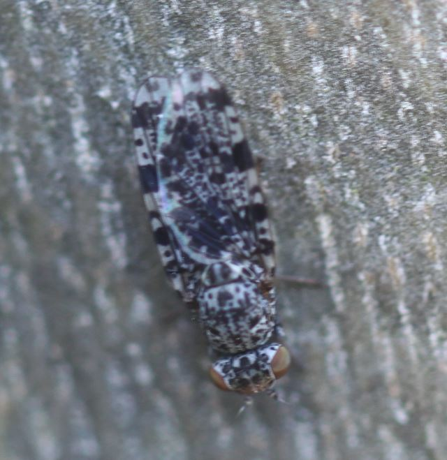 Pfauenfliege (Callopistromyia annulipes) mit angelegten Flügeln am 6. April 2020 in Walldorf/Baden an einer Platane